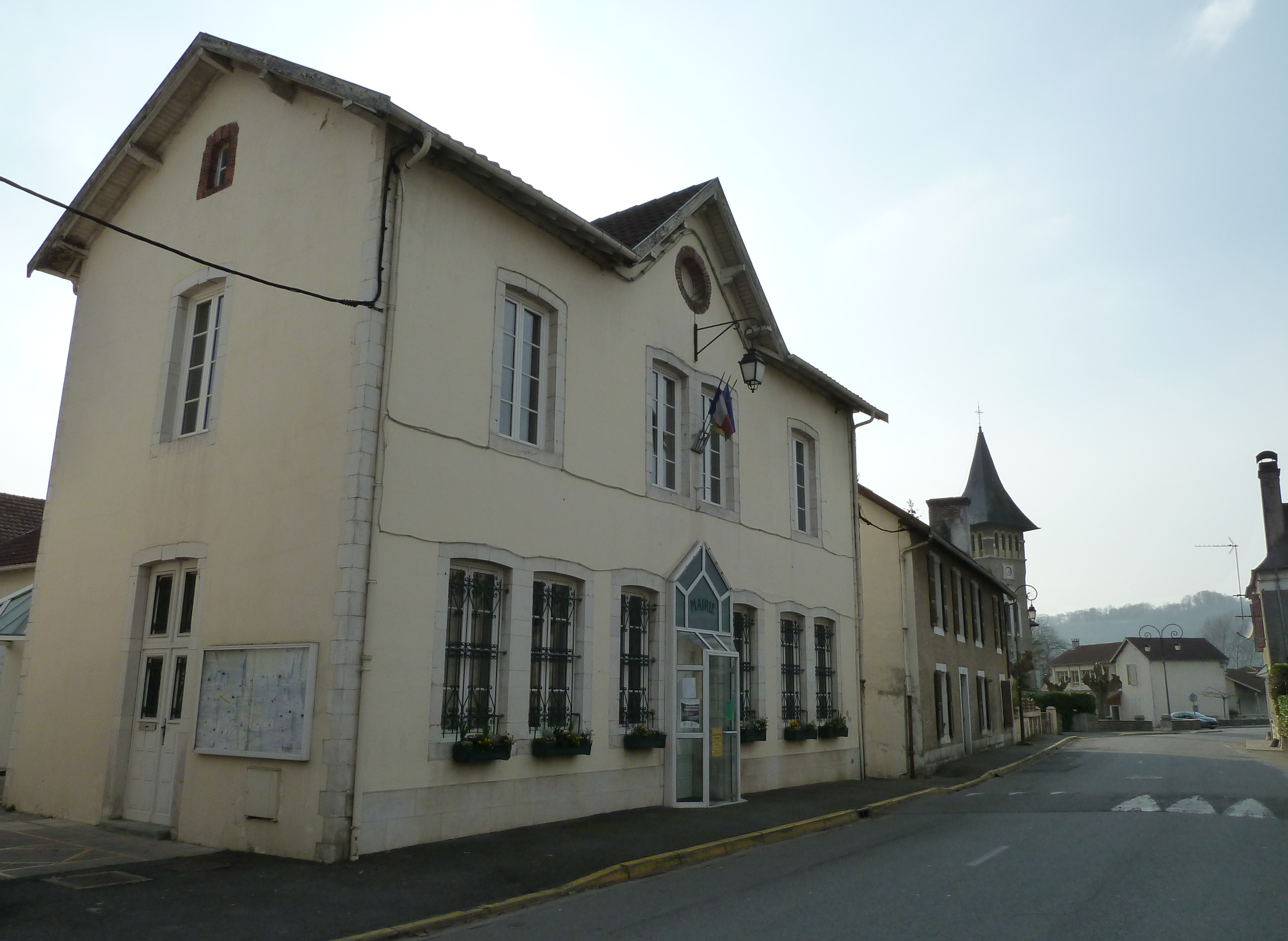 Mairie de Laroin